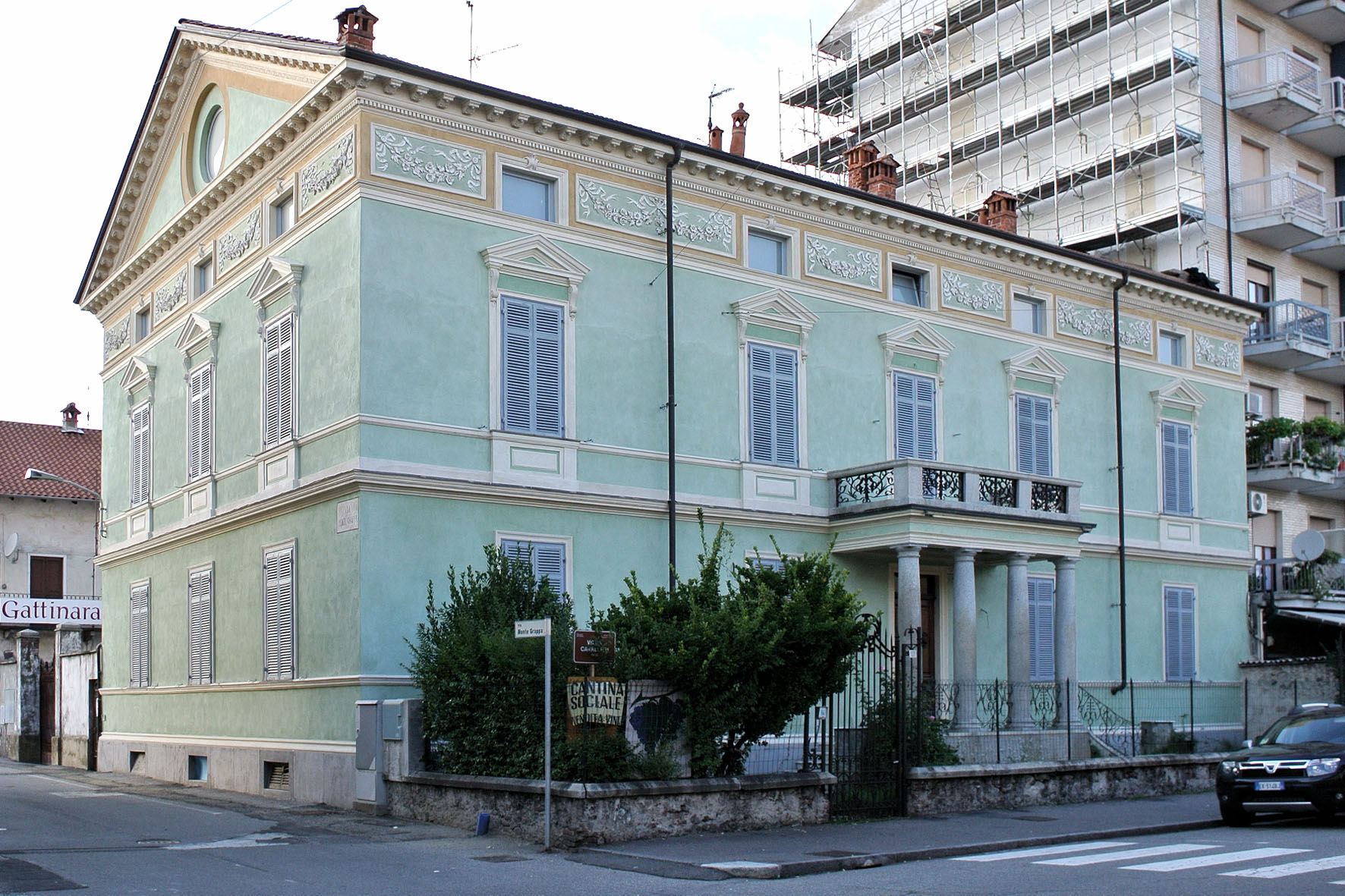 Villa Cavalleri